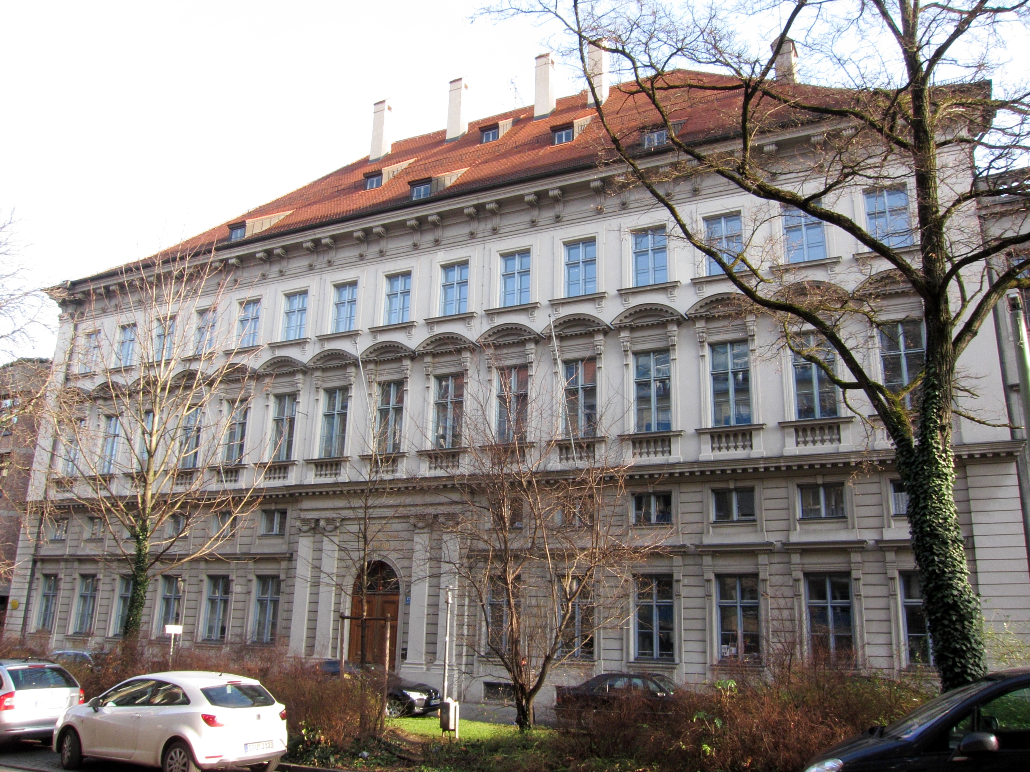 Roßmarkt 15; ehem. neues Landschaftsgebäude, jetzt Deutsche Meisterschule für Mode, frühklassizistischer palastartiger Bau, 1774ff. von François Cuvilliés d. J., wohl erst um 1800 vollendet.